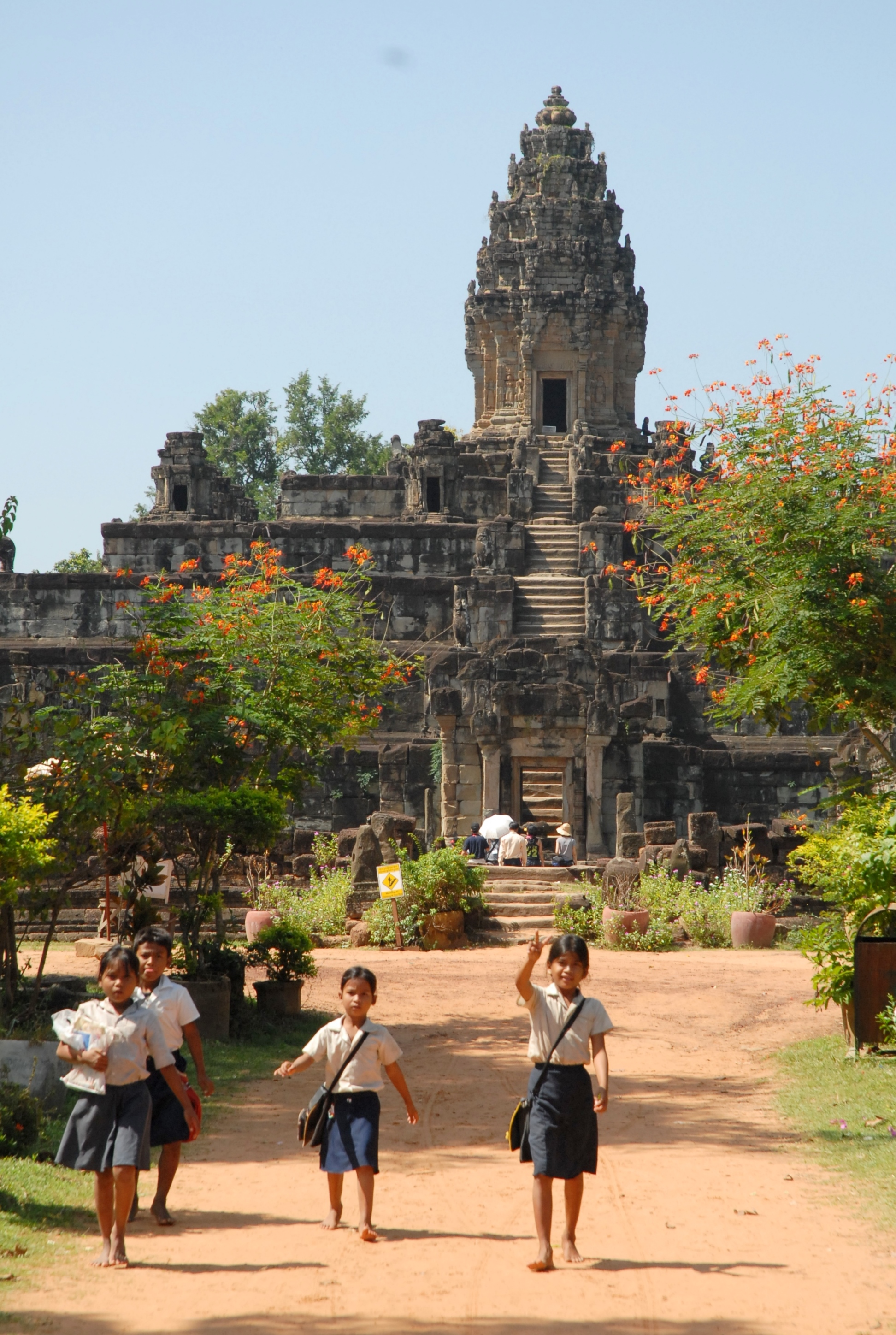 Cambodge, site archéologique d'Angkor (zone de Rolûos), temple-montagne de Bakong (fin du IXe siècle)